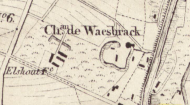 Indication du château de Waesbroeck sur le plan de Vandermaele (1846)